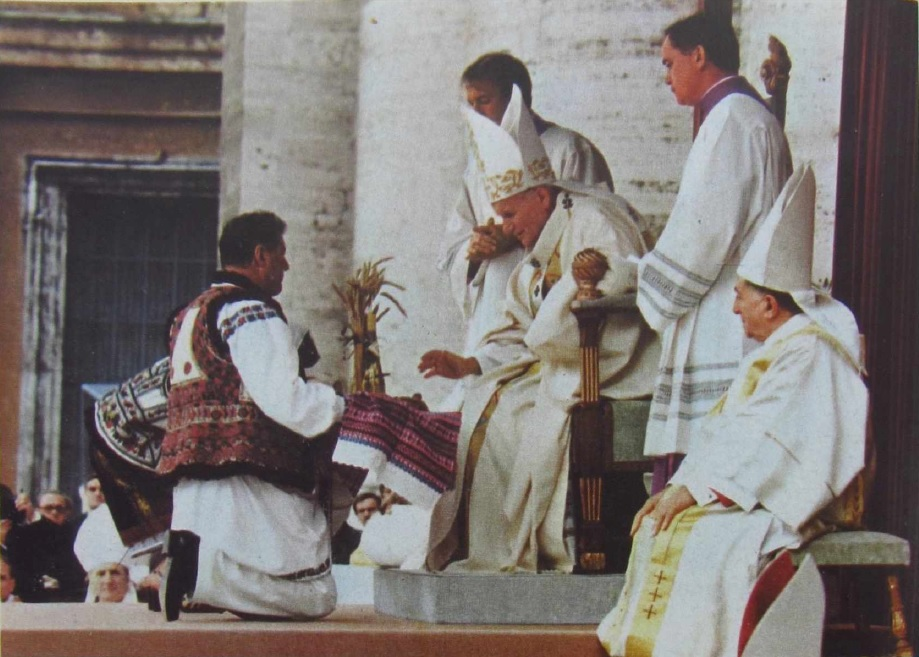 Beatificarea lui Ieremia Valahul de către Papa Ioan Paul al II-lea la 30 octombrie 1983.